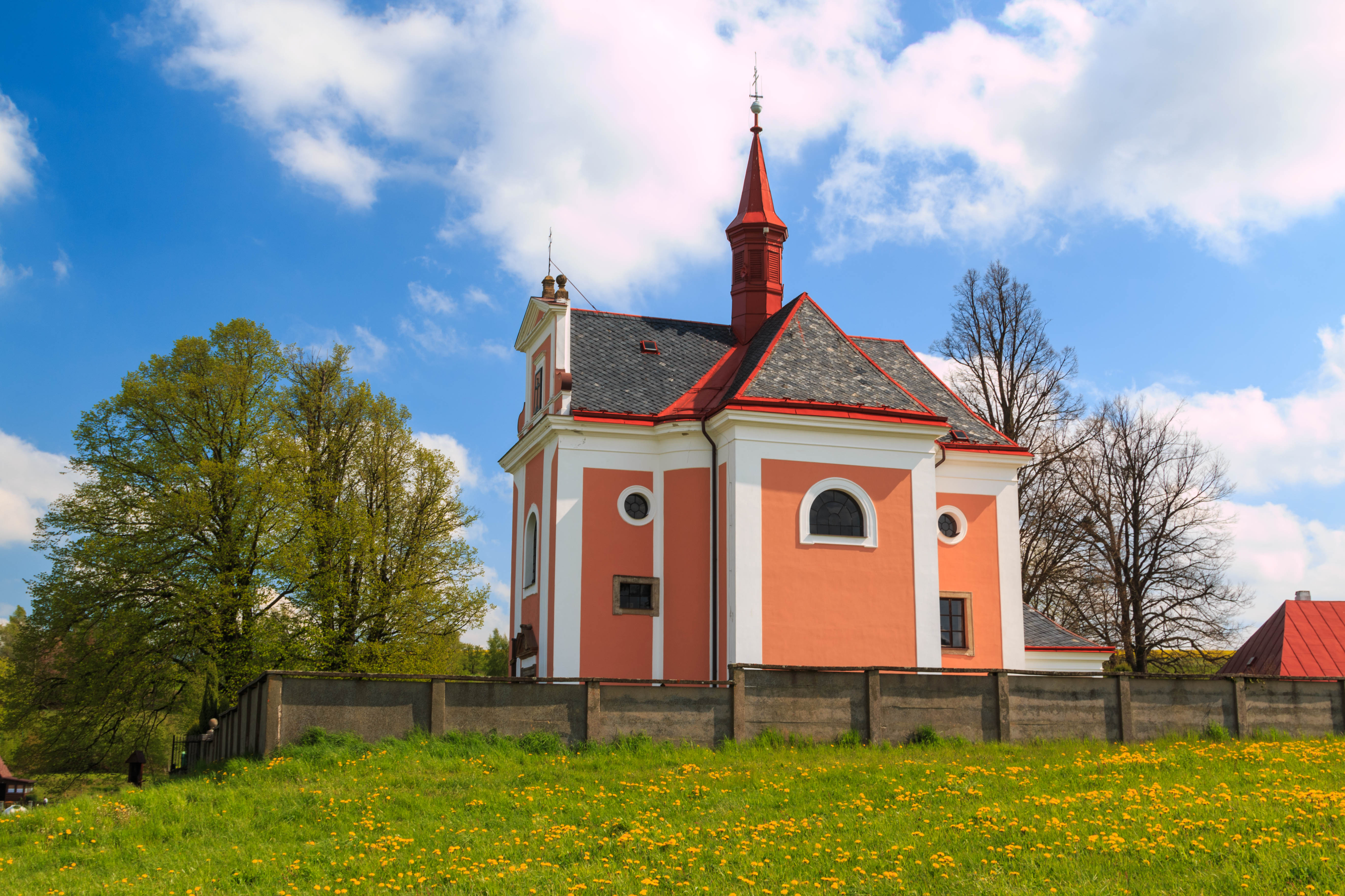 Kostel svaté Anny, Pustá Kamenice.